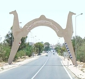 Entrada a Kebili